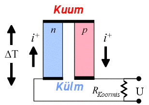 Rakendades elektriliselt jadamisi ühendatud pooljuhtide paarile temperatuuride vahe, tekib elemendi otstel tänu Seebecki efektile pinge. Kui vooluring koormisega sulgeda, tekib ahelas vool. Voolutugevus on piiratud elemendi sisetakistusega (määratud P- ja N-pooljuhi elektritakistusega).